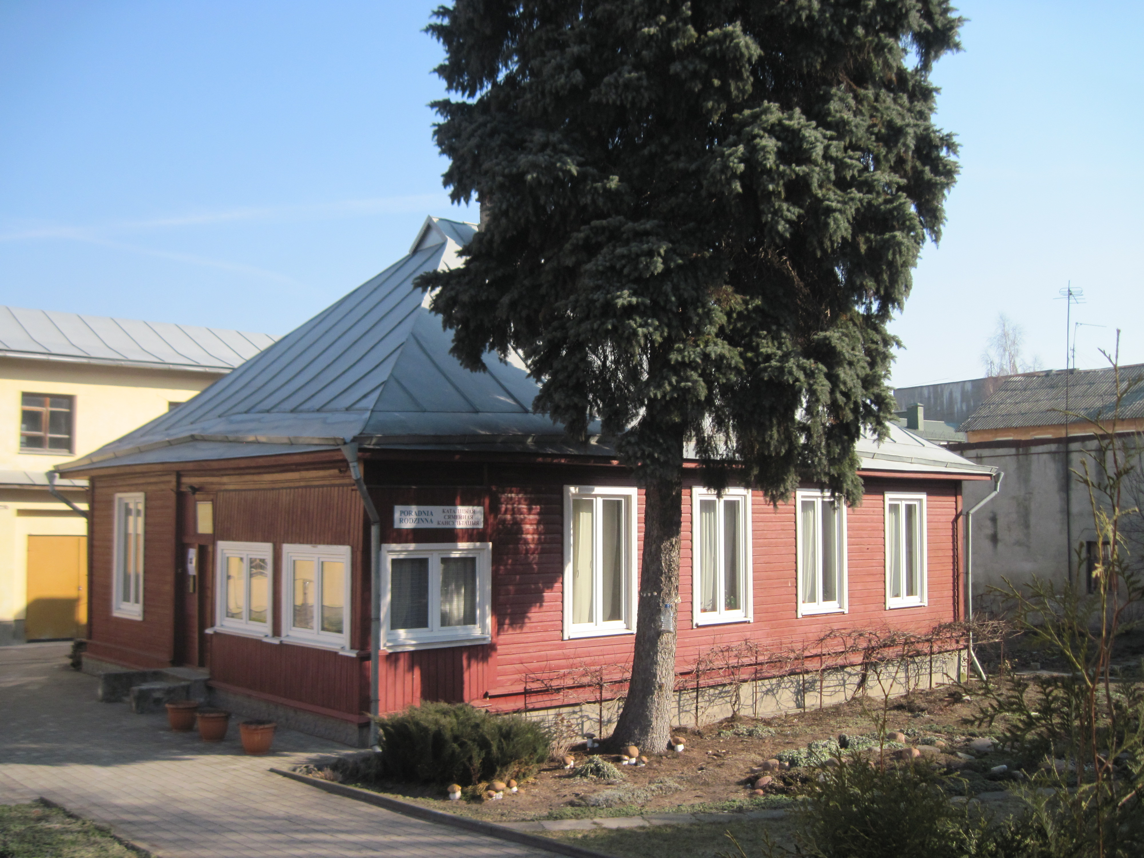 Забудова гістарычнага цэнтра Гродна. Вуліца К. Маркса, 26